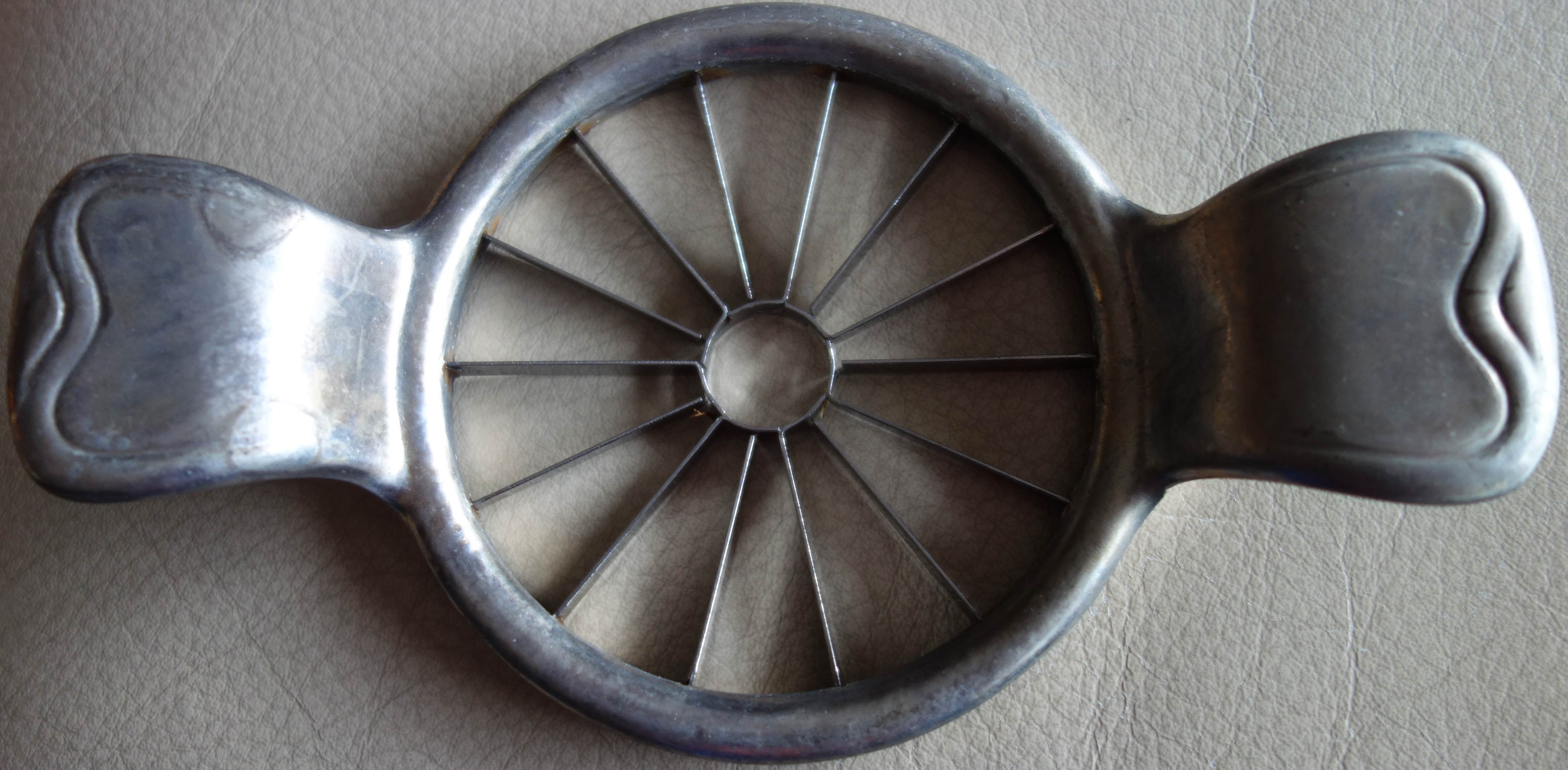 Apfelteiler